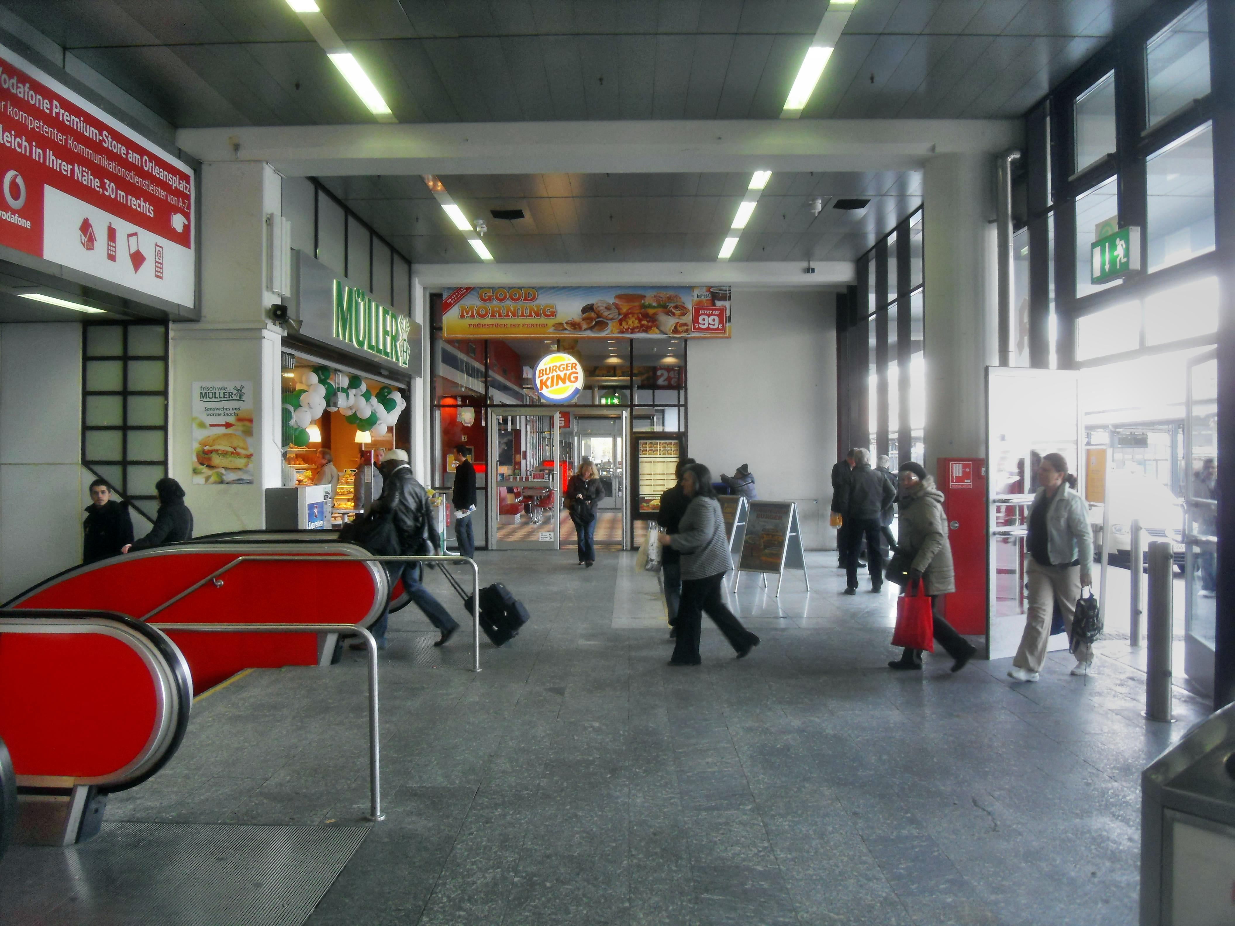 Die Empfangshalle des Bahnhofs München Ost in Bayern (Deutschland)